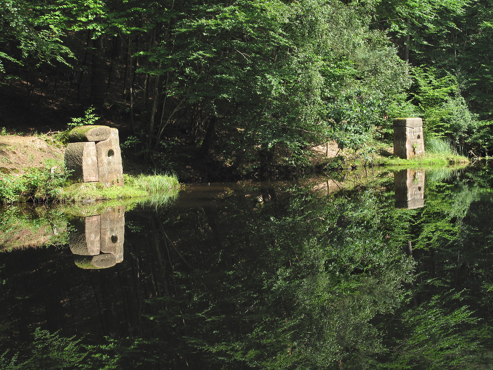 Willi Bauer, Gespräche zum Teich, 1986, - Deutschland, Rheinland-Pfalz, Skulpturenweg Schweinstal